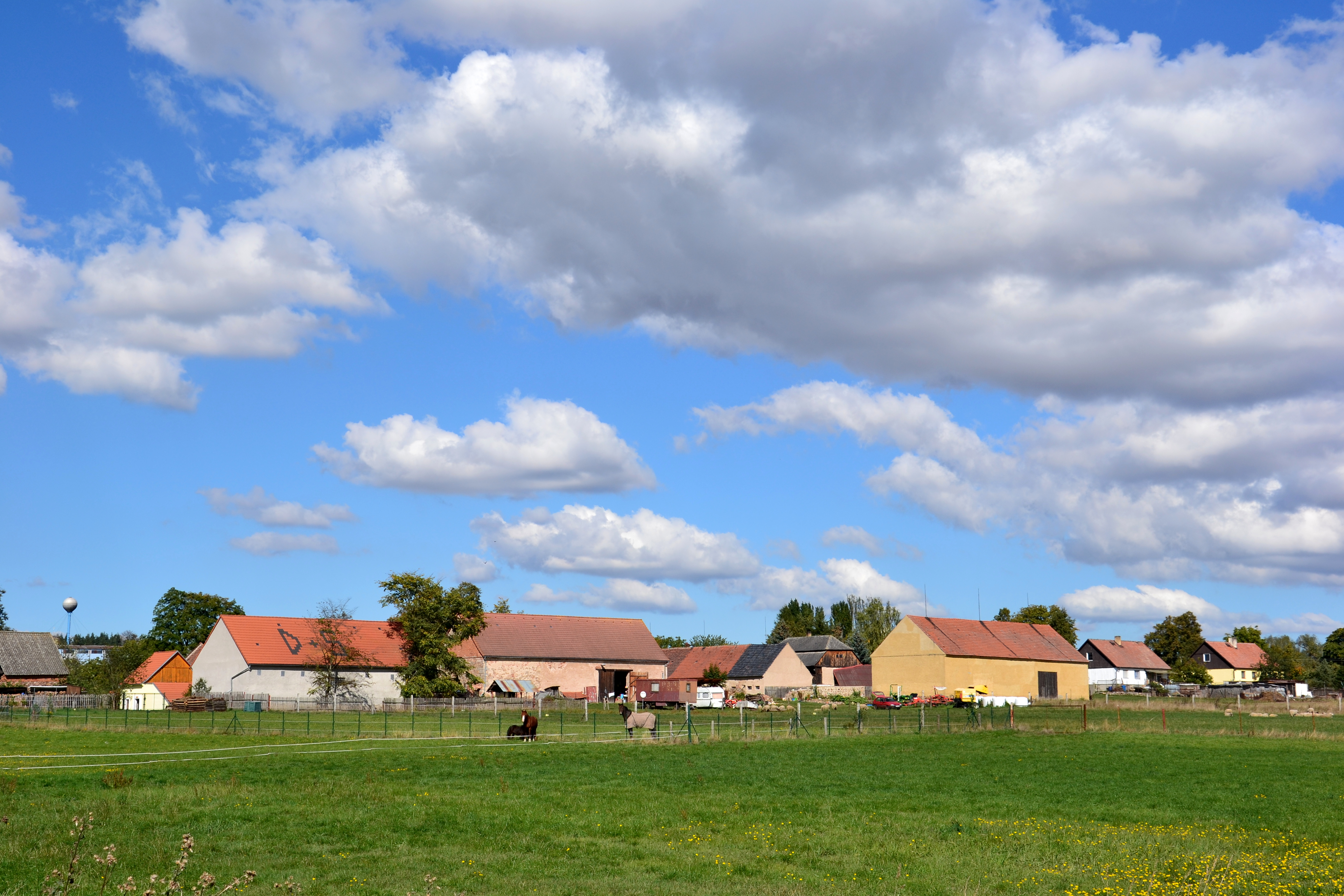 Celkový pohled z jihu